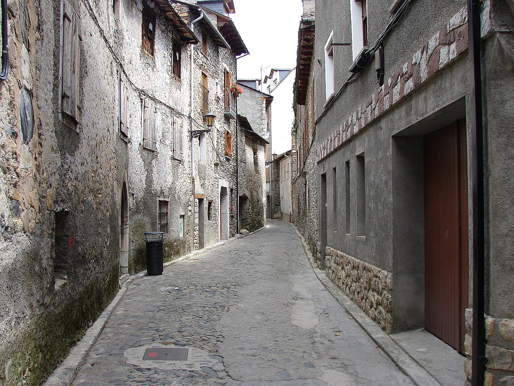 Calle en la localidad oscense de Benasque.